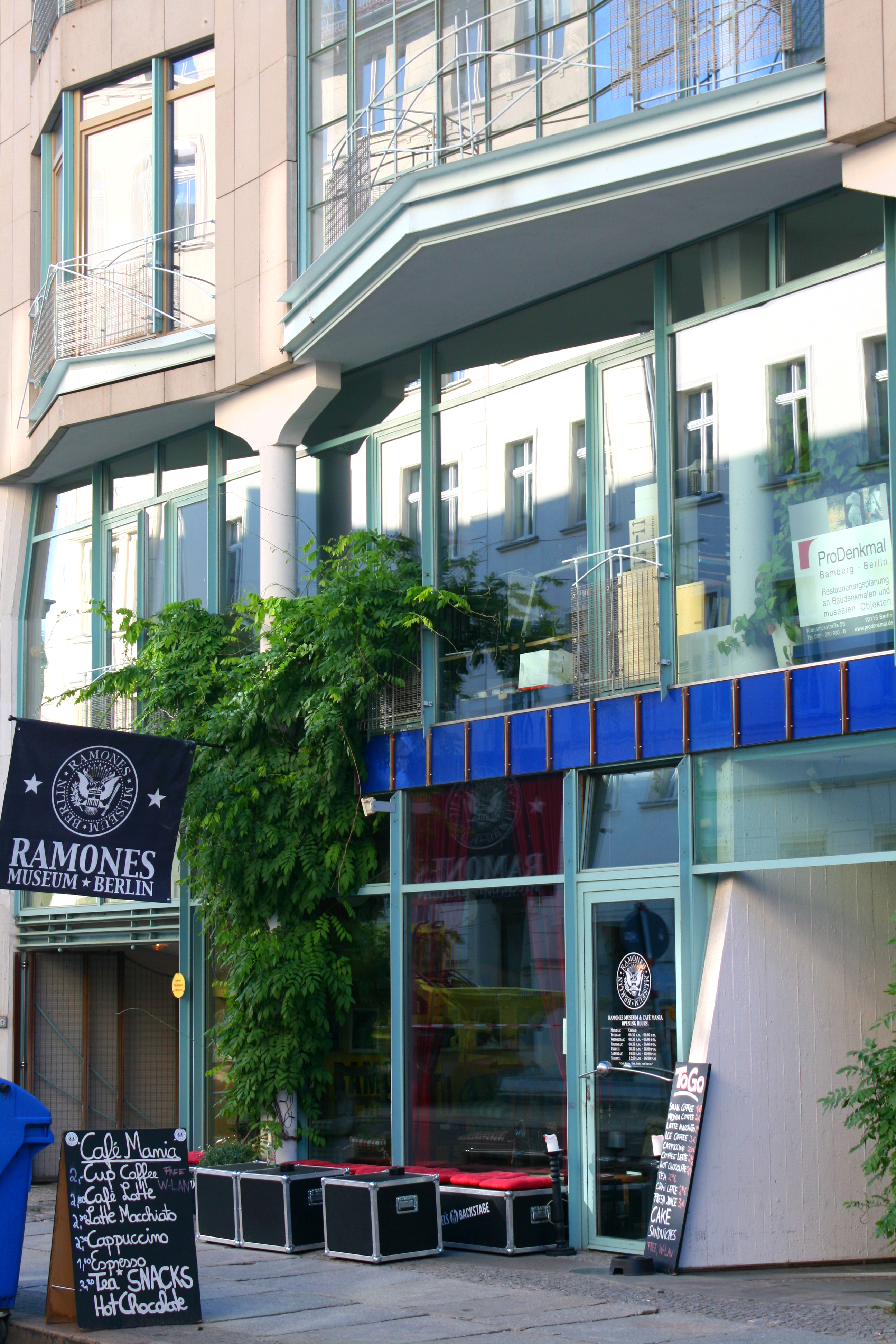 Ramones Museum und Café Mania in Berlin (Mitte)